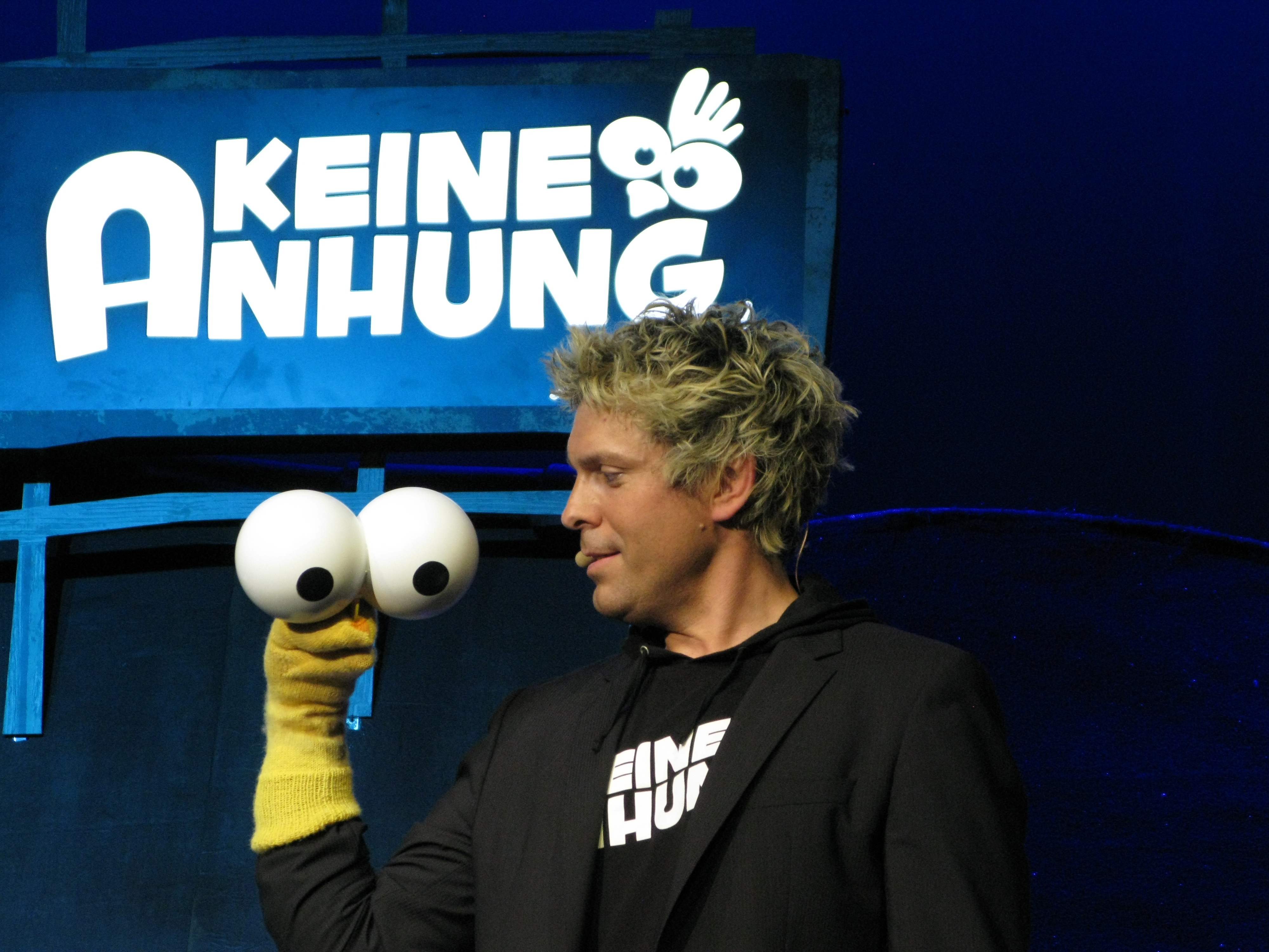 Puppet Comedian Sascha Grammel mit seinem Charakter "Außer Rüdiger"